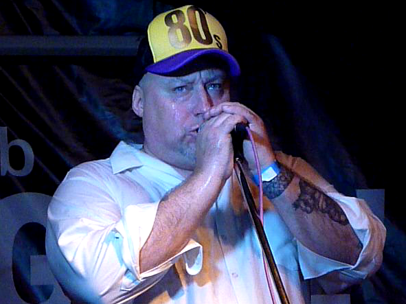 Вокалист группы НОМ — Кагадеев Сергей в клубе Гоголь, Москва. 30 сентября 2011 г.